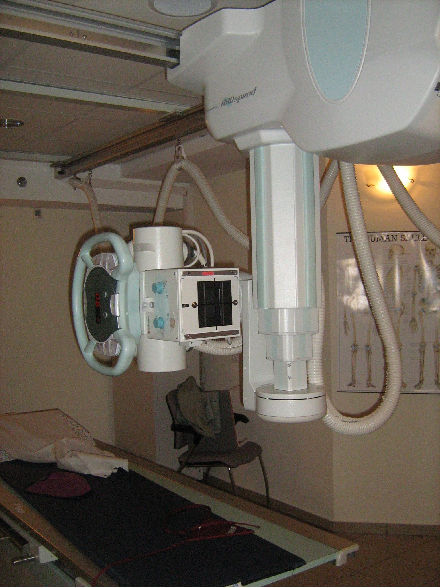 מתקן צילום רפואי בקרני רנטגן